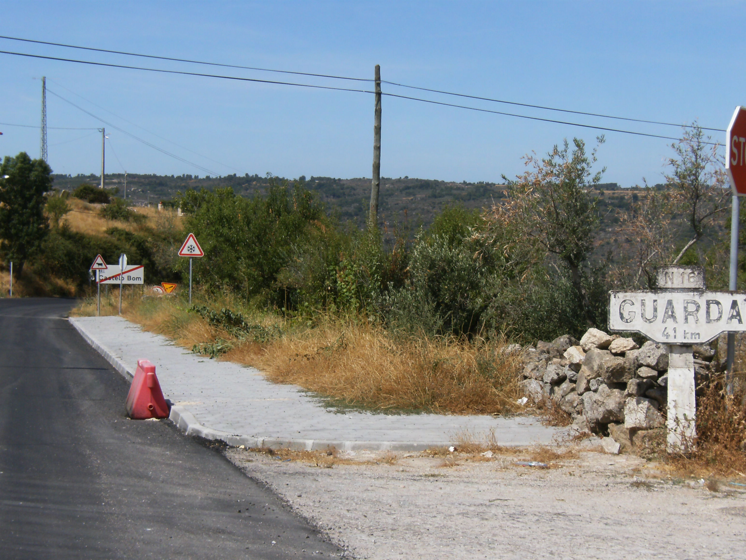 N16 entre Aveiro y Vilar Formoso. Construida en los años 30, fue el principal eje de conexión de Portugal con el resto de Europa. Posteriormente, en los años 80, fue remplazada por la vía rápìda IP5 y, en los años 2000, se construyó la Autopista A25.